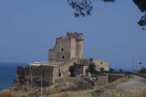 Castello della Pietra di Roseto Capo Spulico (Italy) (XIII century).